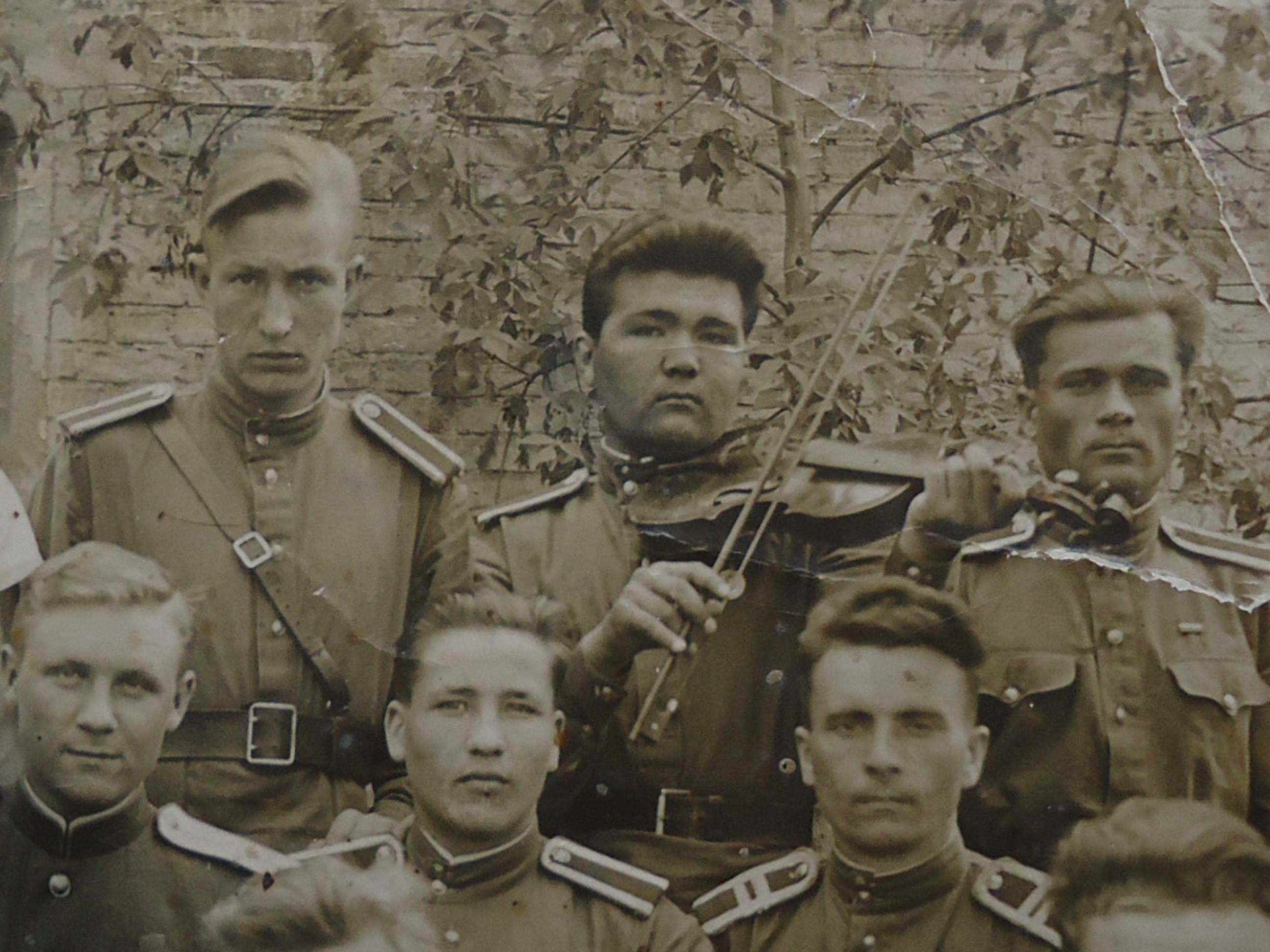 Башҡортса: Сөләймәнов Әһлей скрипкаһынан бер ҡасан да айырылмай. Рязань милиция мәктәбе, 1946 йыл.